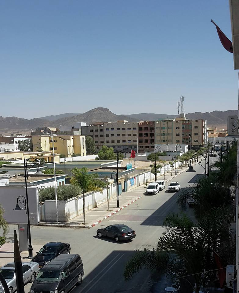 وسط مدينة الدريوش، إقليم الناظور، جهة الشرق